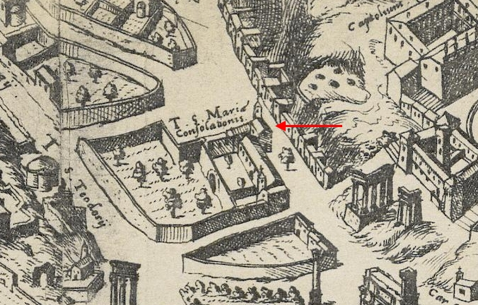 Pianta di Dupérac